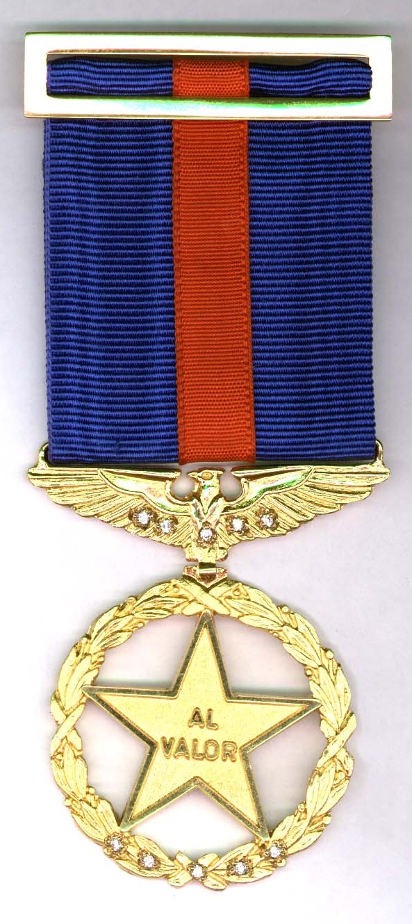 Insignias de la Condecoración de Primera Clase. Tamaño normal y miniatura para su uso en el uniforme de gran gala